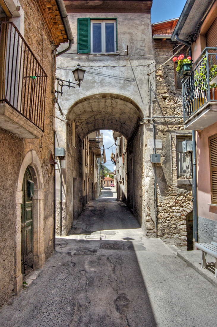 il caratteristico arco che immette nel quartiere di Santa Maria